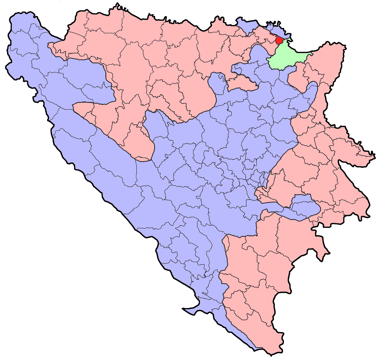 Republika Srpska (BiH) municipality